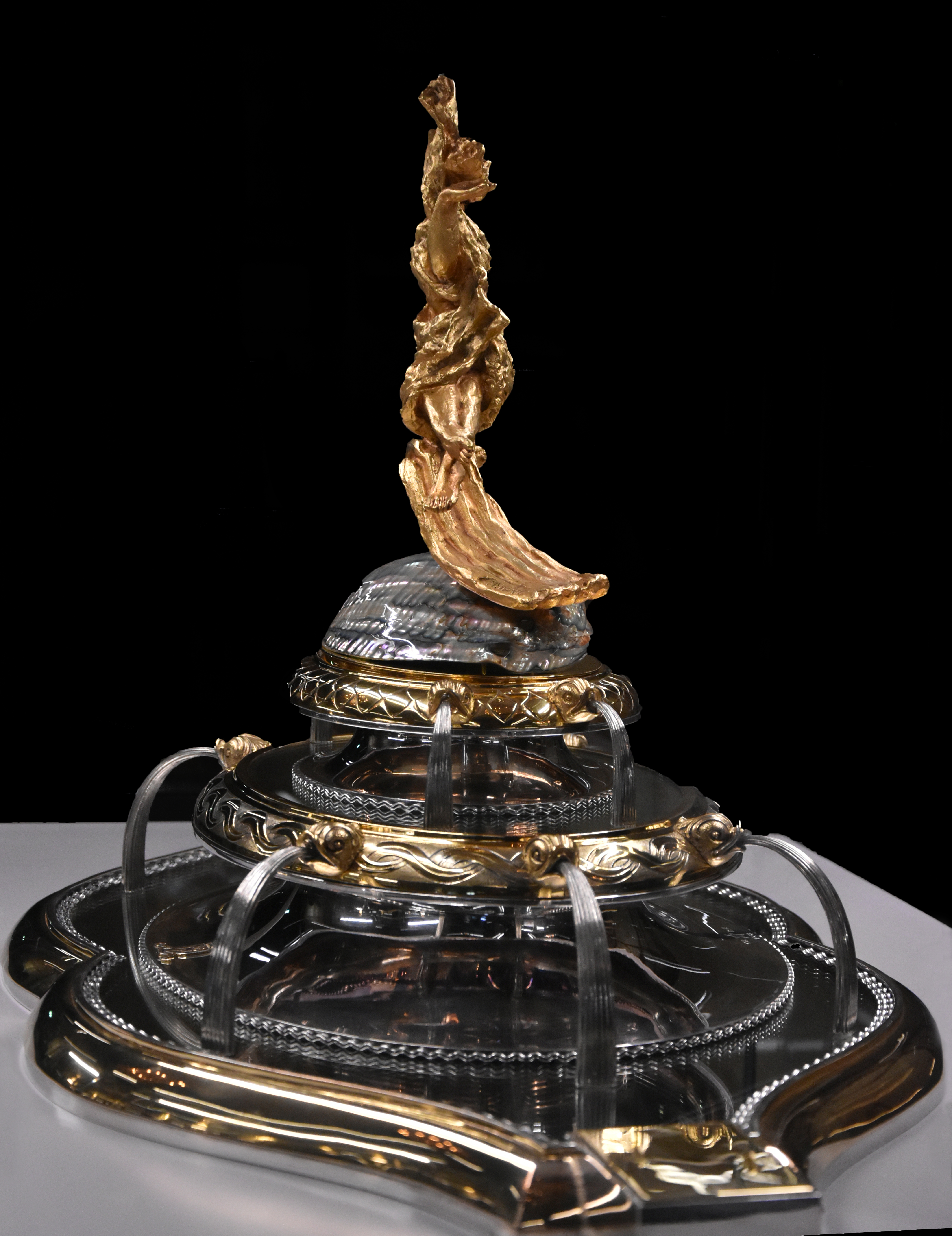 Ondine (tafelmiddenstuk) DIVA Antwerpen 27-12-2018